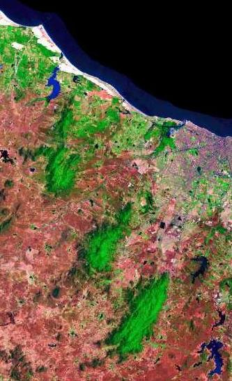 Serra do Juá (Caucia), Serra de Maranguape (Maranguape), Serra da Aratanha (Pacatuba), estado do Ceará, Brasil.